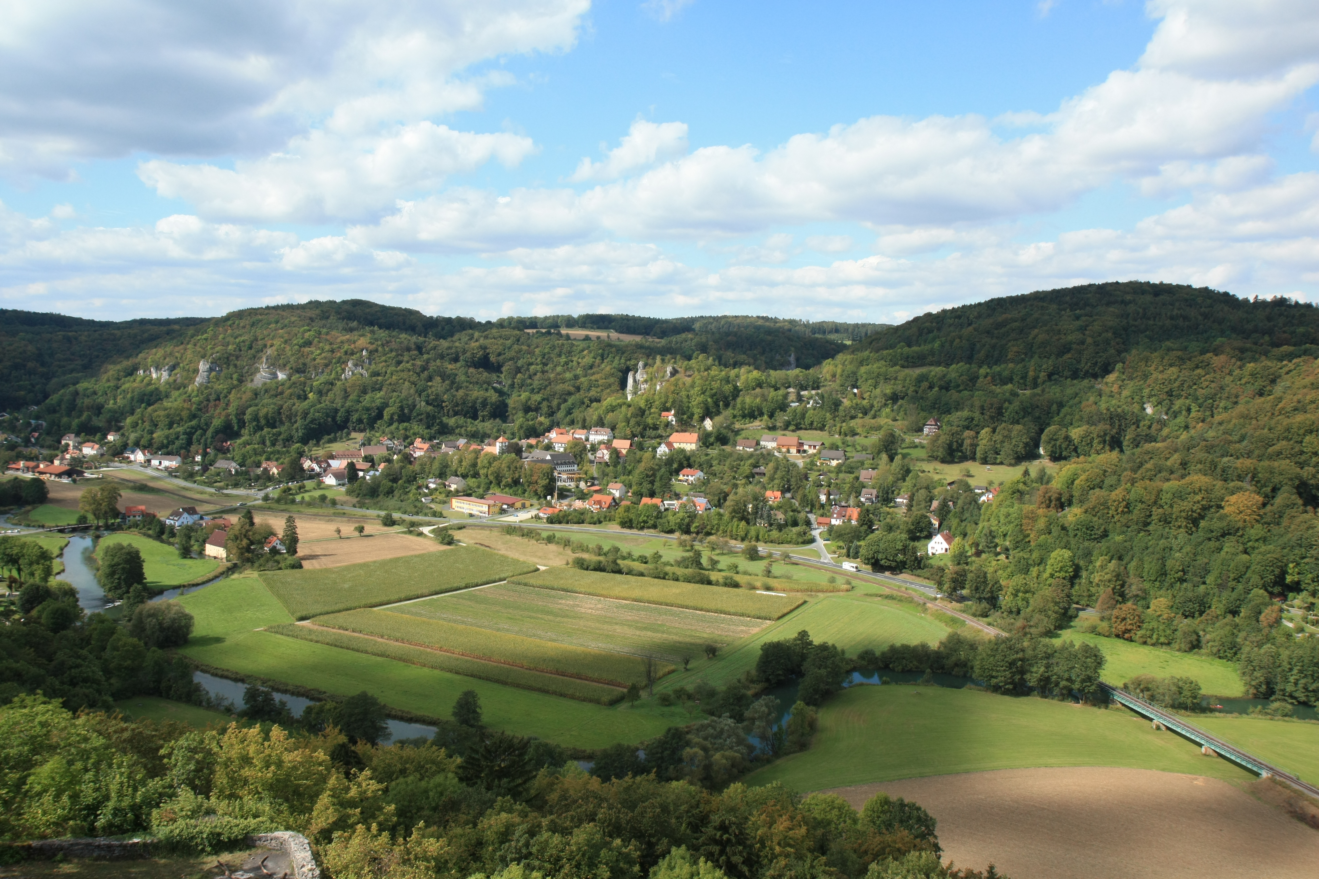 Stadt und Burgfelsen Streitberg von der Burg Neideck aus